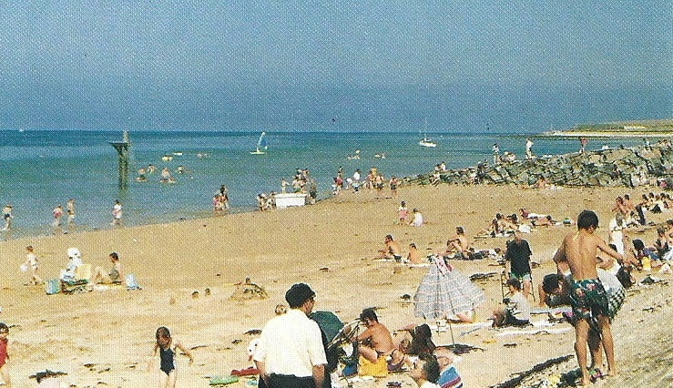 plage de Grandcamp-Maisy un jour de soleil (vacances)